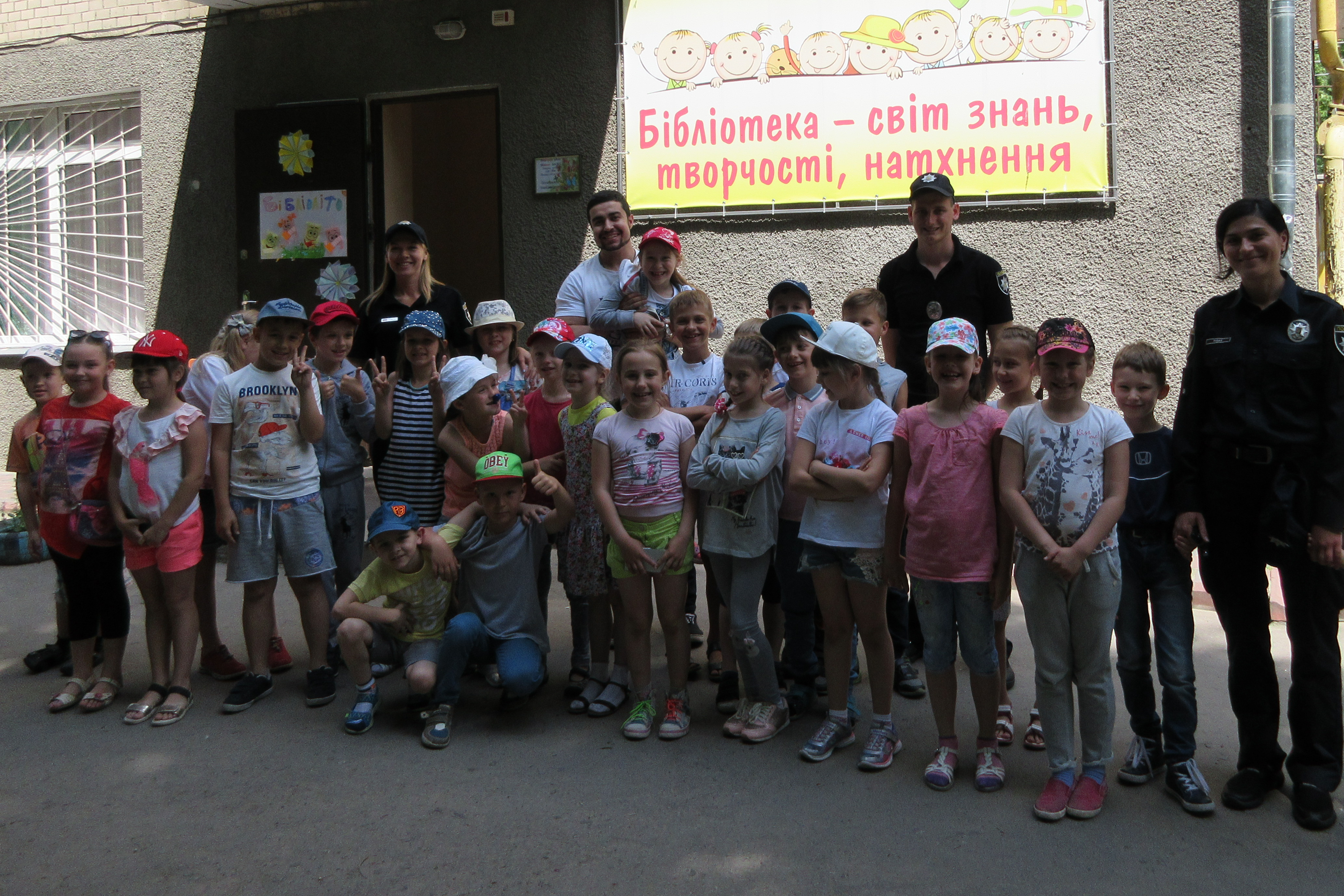 Фотографія.